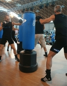 Lezione di Beat IT a Rimini Wellness 2009